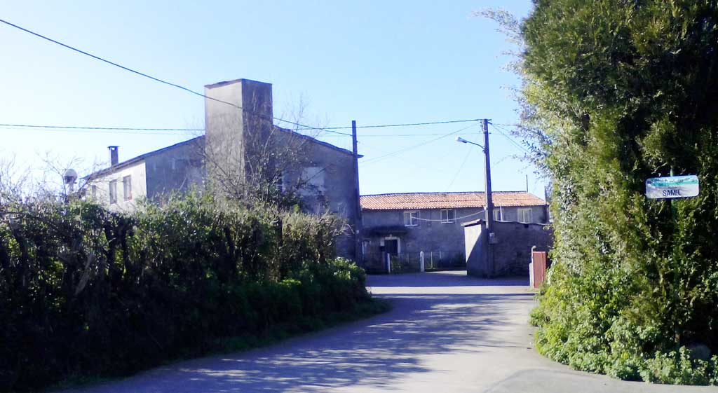 Lugar de Samil.